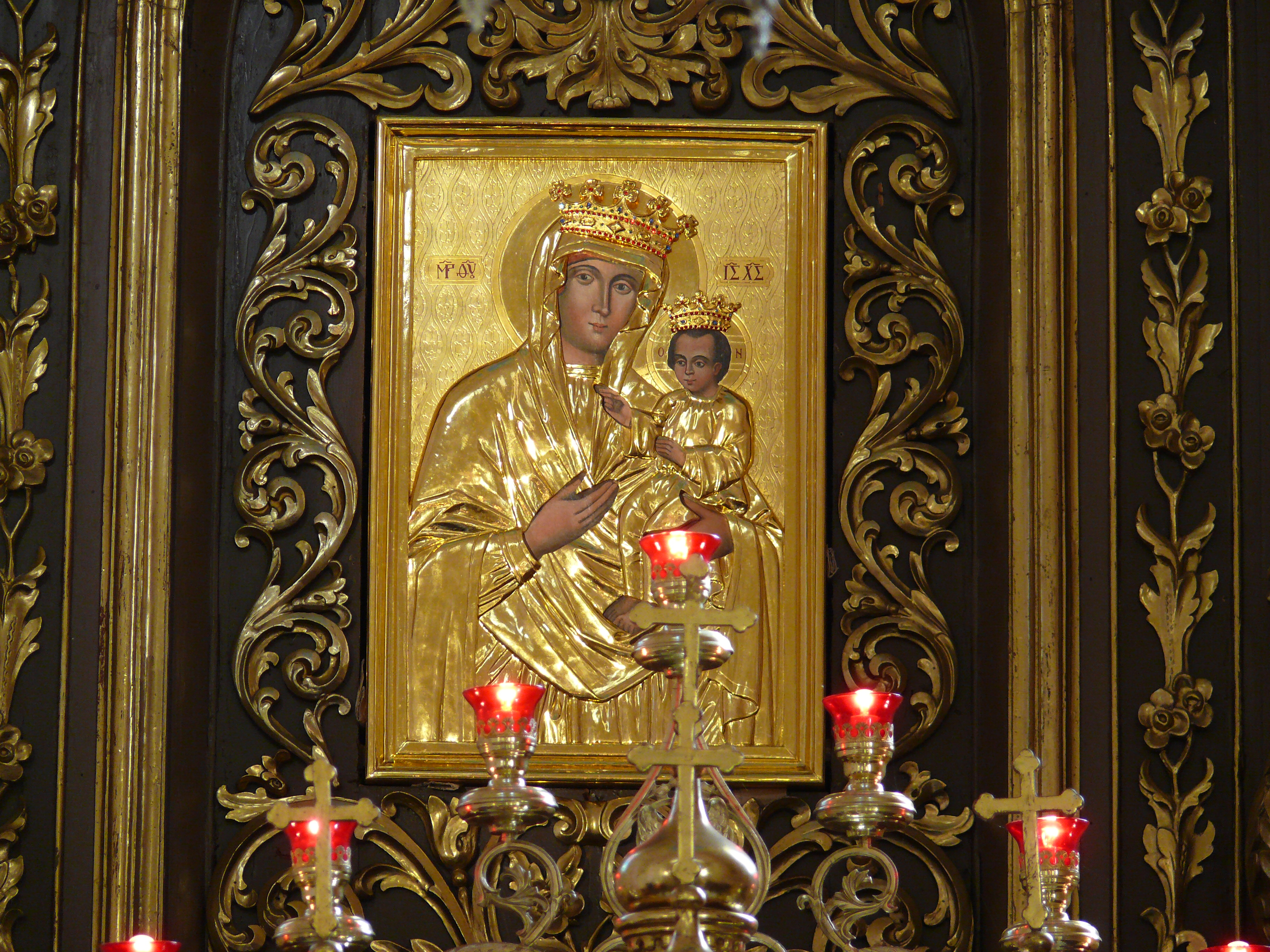 Чудотворна iкона Пресвятої Богородицi Тучнянської, с.Тучне Перемишлянського району